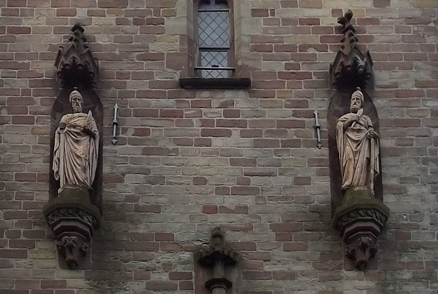 Statuen der Kirchenpatrone am Turm der Kirche St. Johannes und Paulus, Beckingen